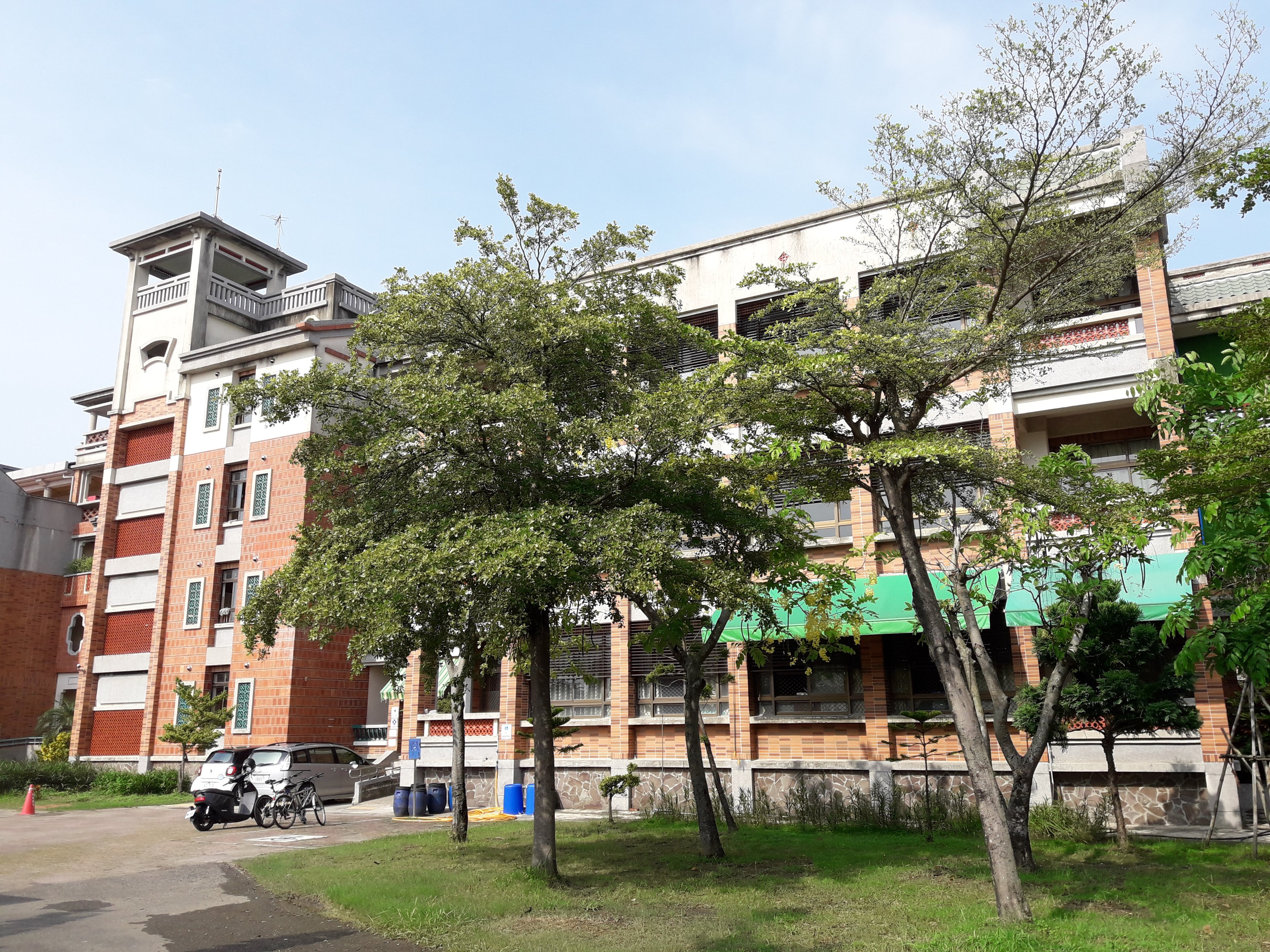 臺南市立和順國民中學文昌樓。